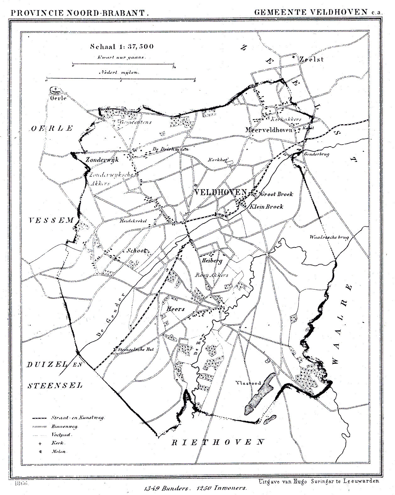 Nederland, Noord-Brabant, Gemeente Veldhoven